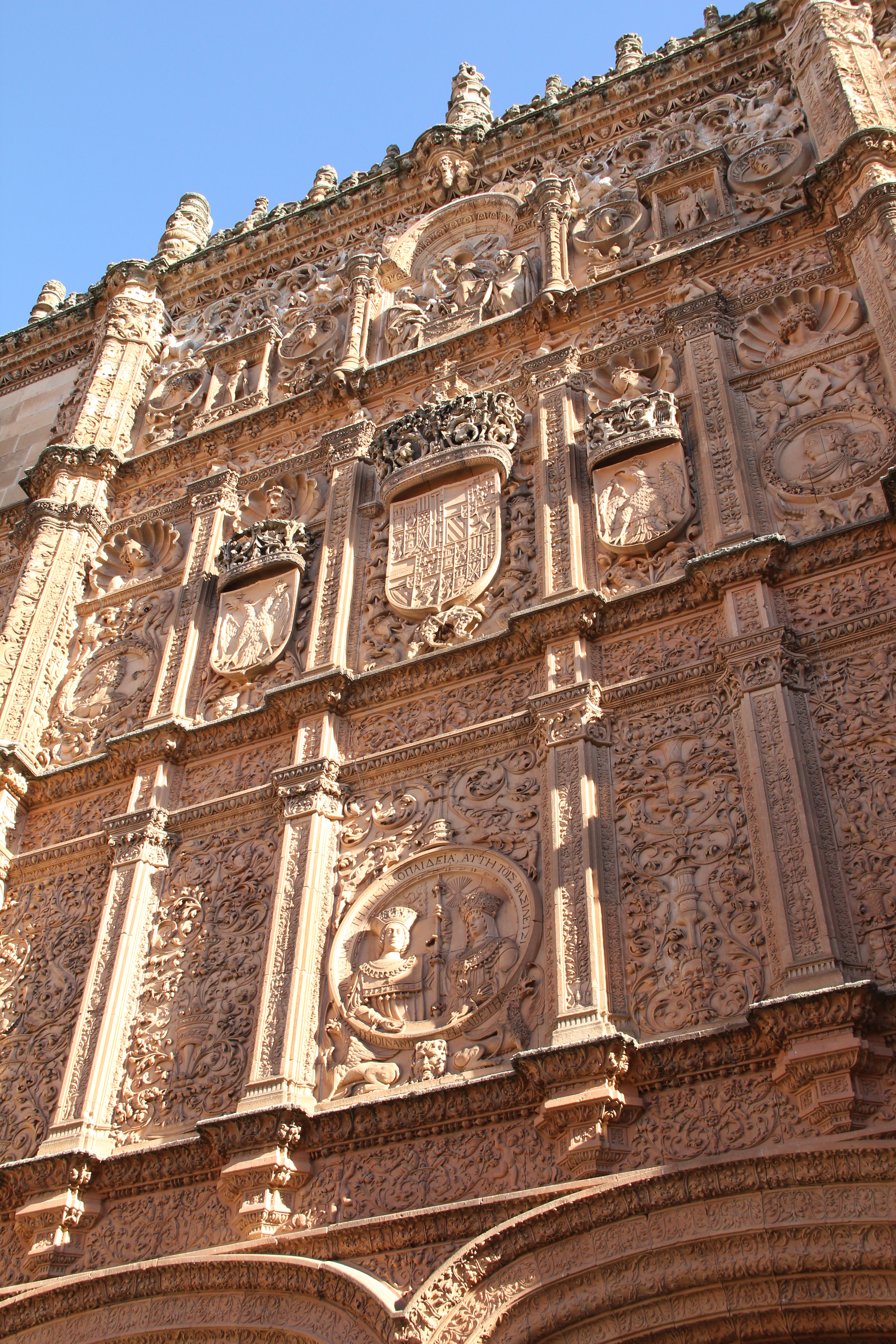 Fachada principal de la vieja Universidad de Salamanca.